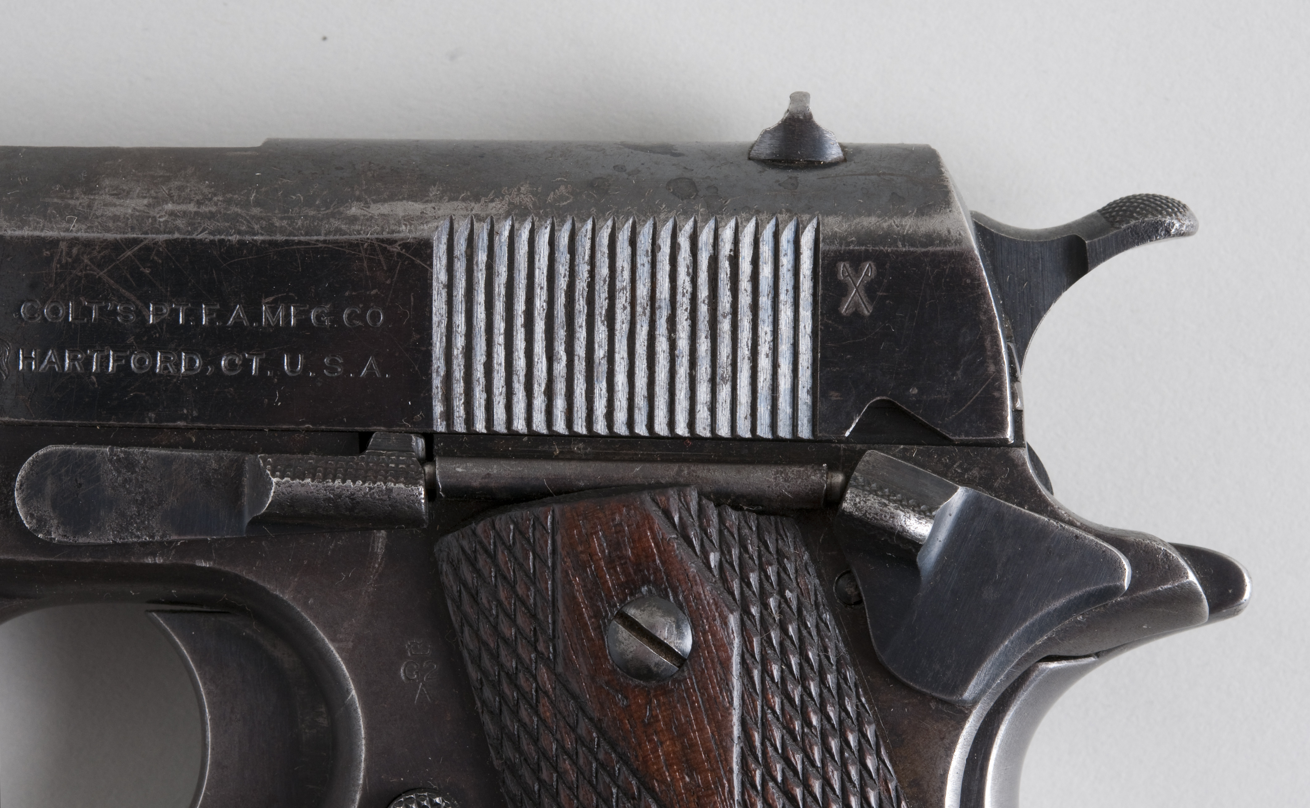 Colt 1911 455 detalj 1 From flickr user handvapensamlingen - Pistols used in Norway.